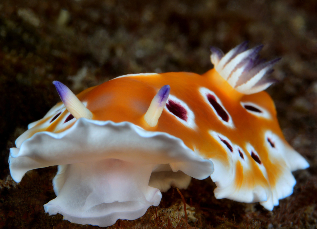 Goniobranchus cf. geminus (ou Goniobranchus sp. 19 selon le NSSI) à la Réunion.